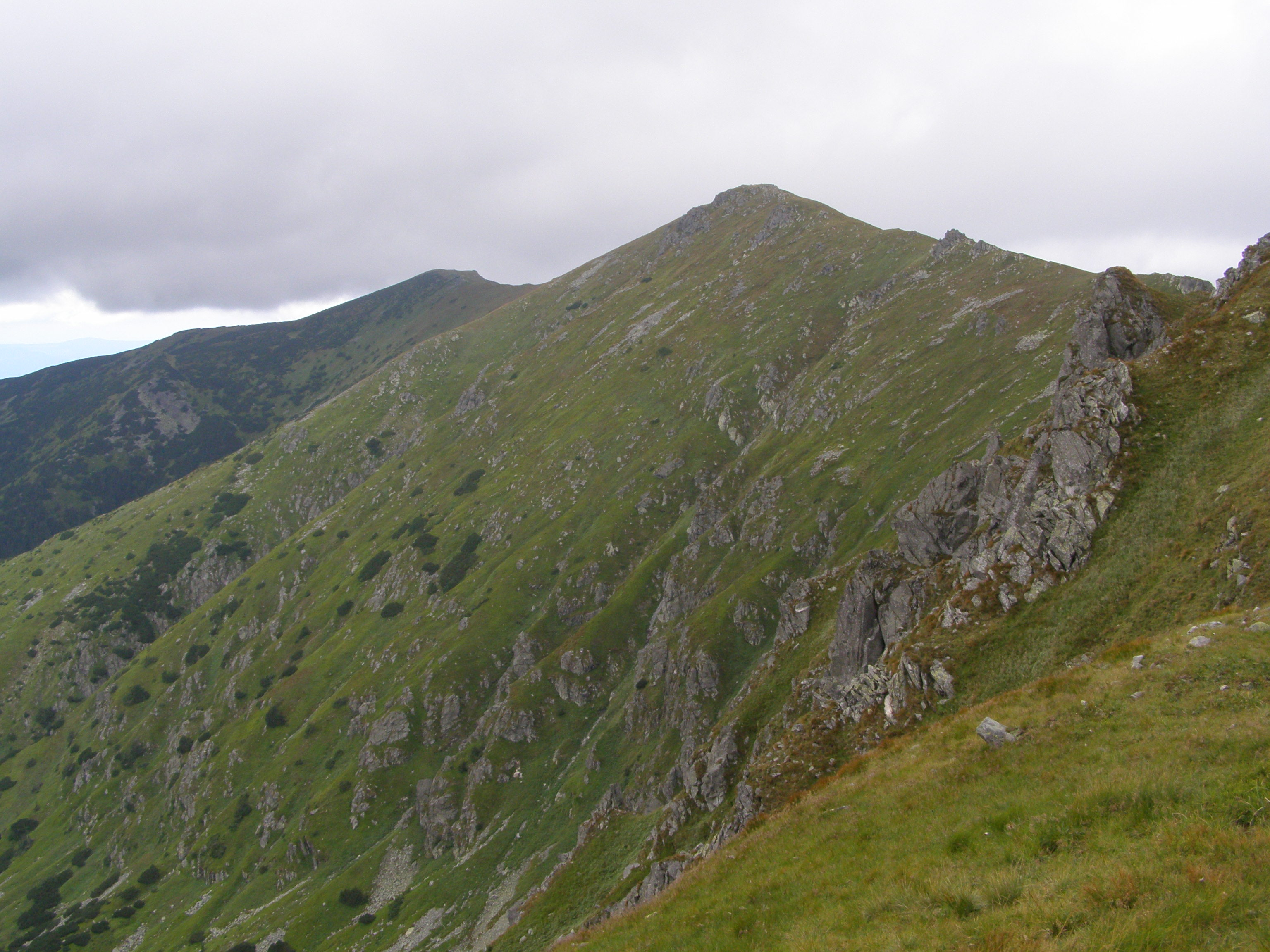 Nízké Tatry, Ďumbierské Tatry, západní svahy trojvrcholového vrchu Bôr, pohled ze západního úbočí vrcholu Poľana (1890 m)